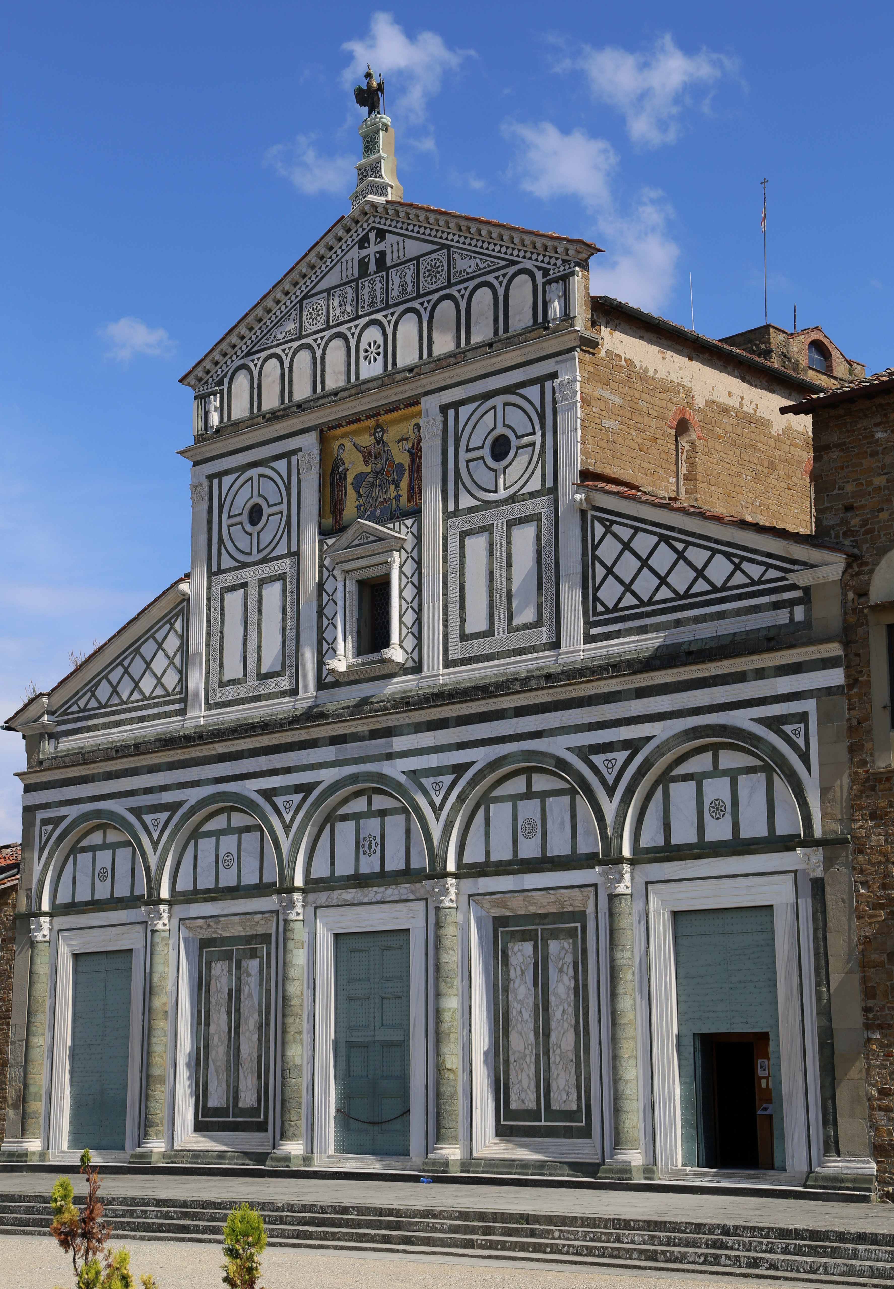 San Miniato al Monte, Florenz